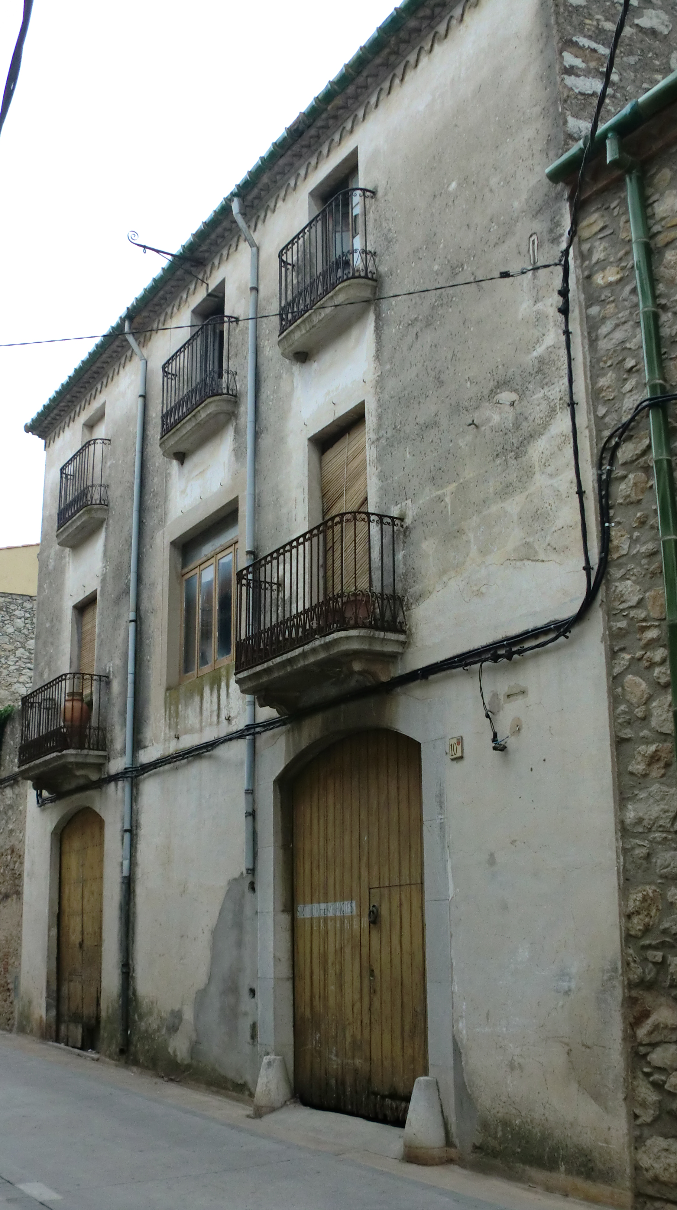 Casa al carrer del Pont, 10 (Pont de Molins)